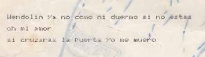 Texto mecanografiado por Luis Alberto Spinetta de la letra de Wendolin, Don Lucero, 1989. Documento exhibido en la muestra "Los Libros de la Buena Memoria", Biblioteca Nacional, octubre/diciembre 2012.